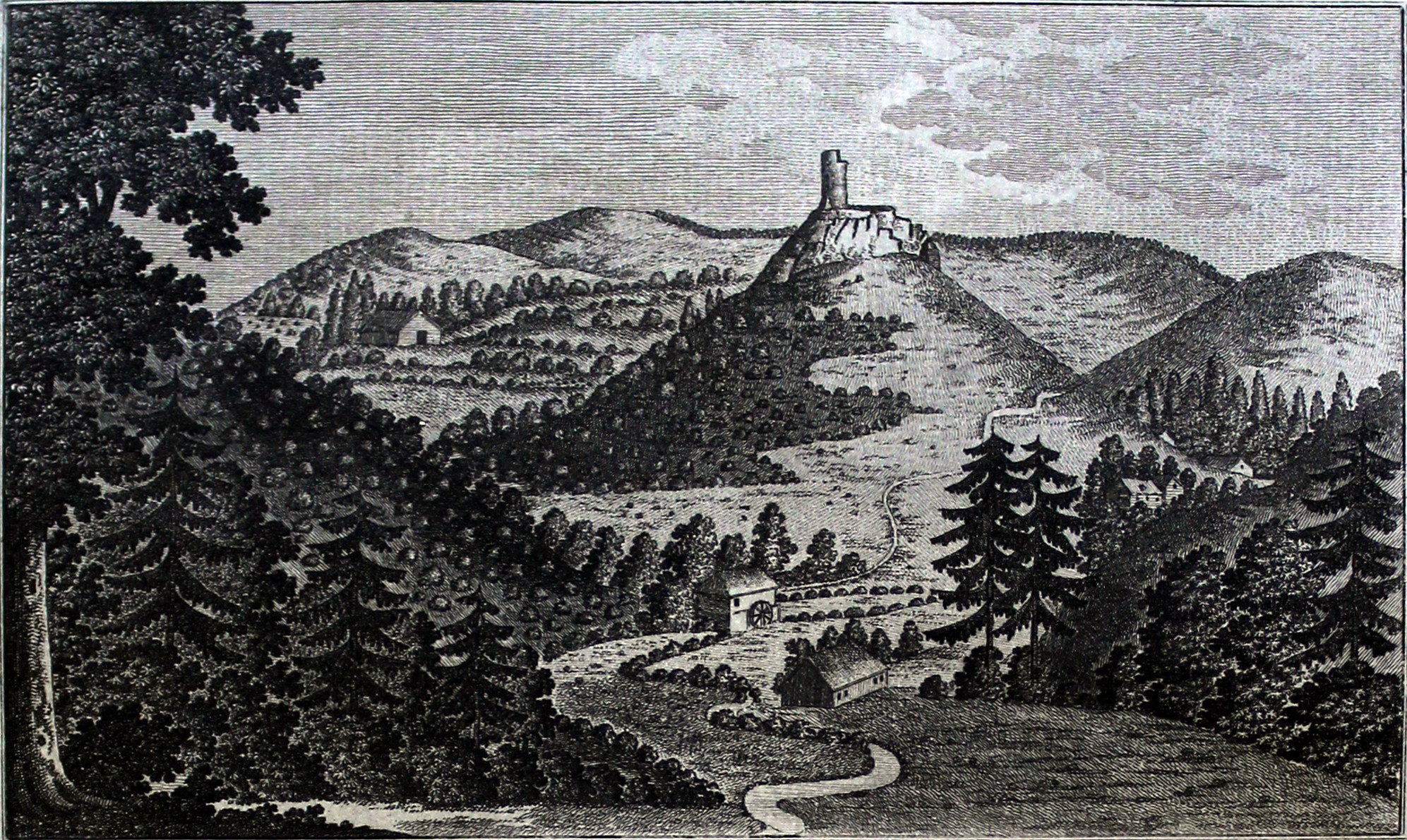 Stich der Burgruine Niesten aus dem Jahr 1855. Ausschnitt aus einer Radierung von Eustach Friederich, angefertigt nach einer Federzeichnung von Johann Kaspar Weinrauch. (Quelle dieser Beschreibung: Dippold, Günter (Hrsg.): Weismain - Eine fränkische Stadt am nördlichen Jura 1. Dechant Bau GmbH, Weismain 2011, ISBN 978-3-9814302-0-2, S. 127)